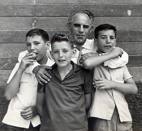 Pele nens